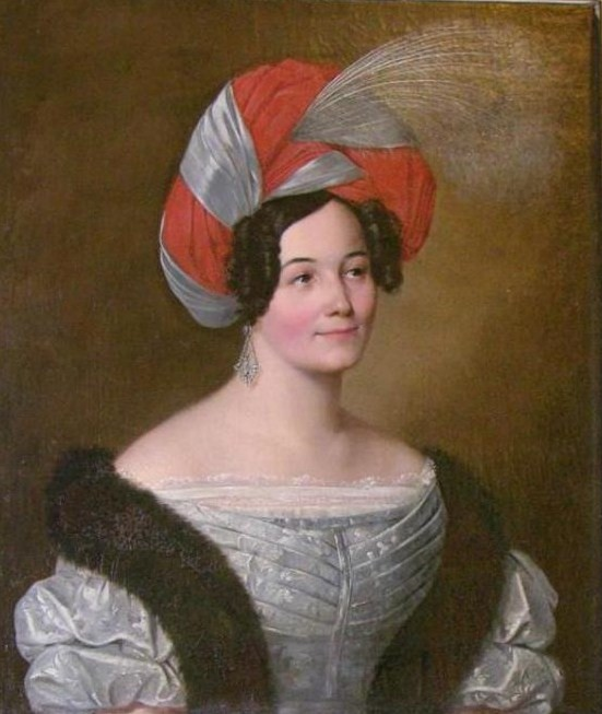 Графиня Любовь Николаевна Зубова (1802 - 1894), в замужестве Леонтьева.